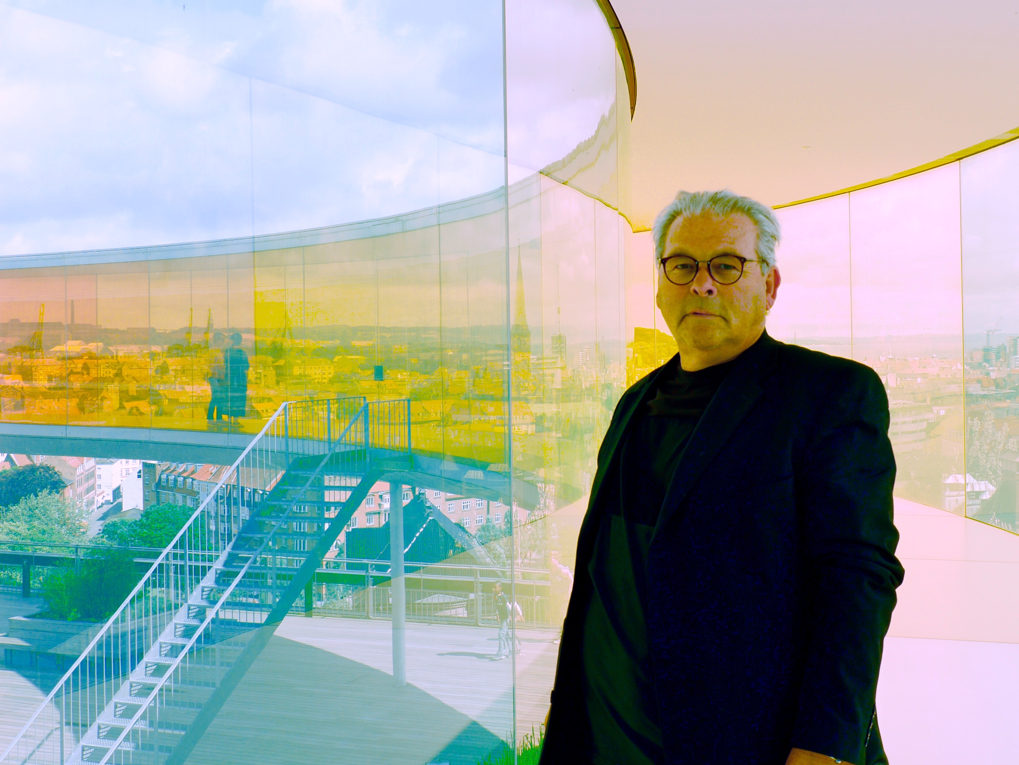 Forfattar og visesongar Atle Hansen, fotografert i Aros, Århus.